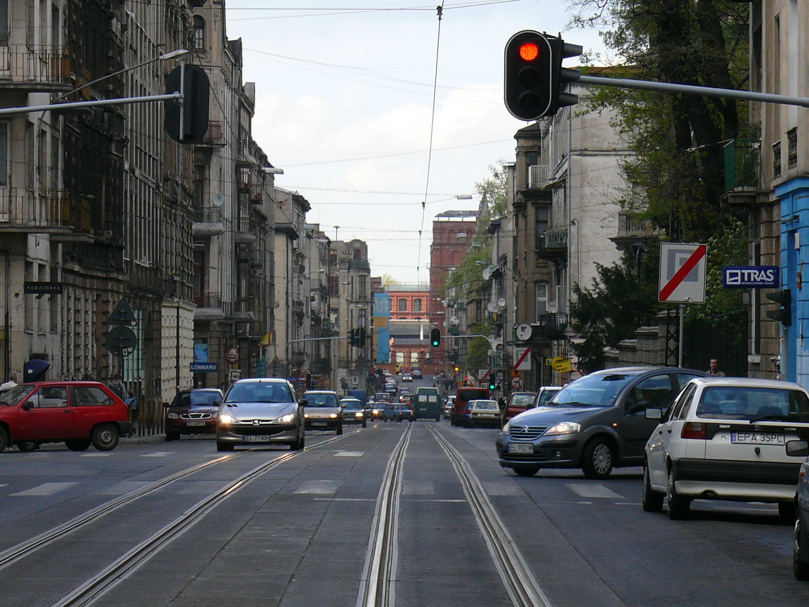 ulica Gdańska w Łodzi